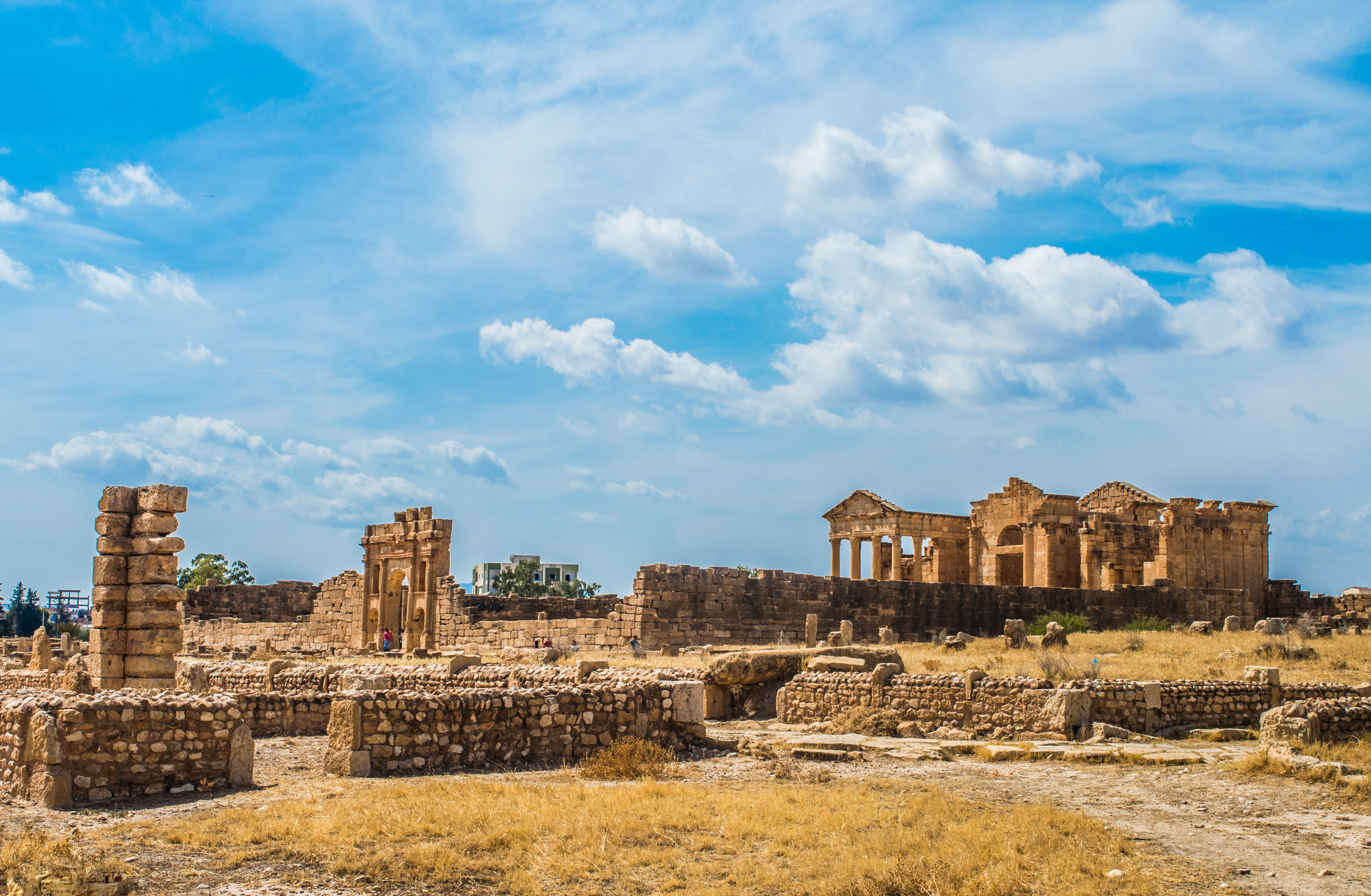 Trois temples